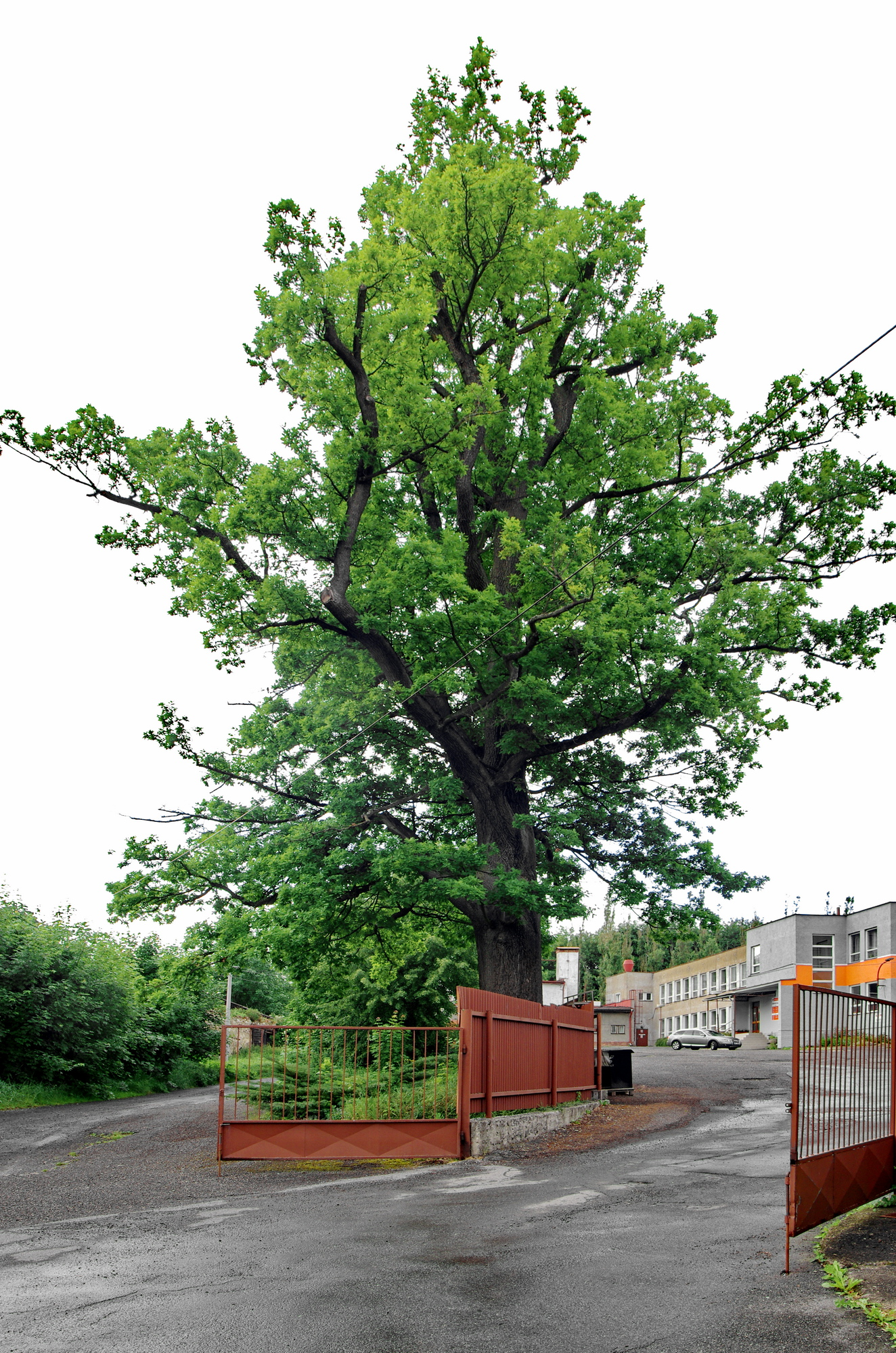 Památný strom - Dub u Hamrnického zámečku, Hamrníky, okres Cheb